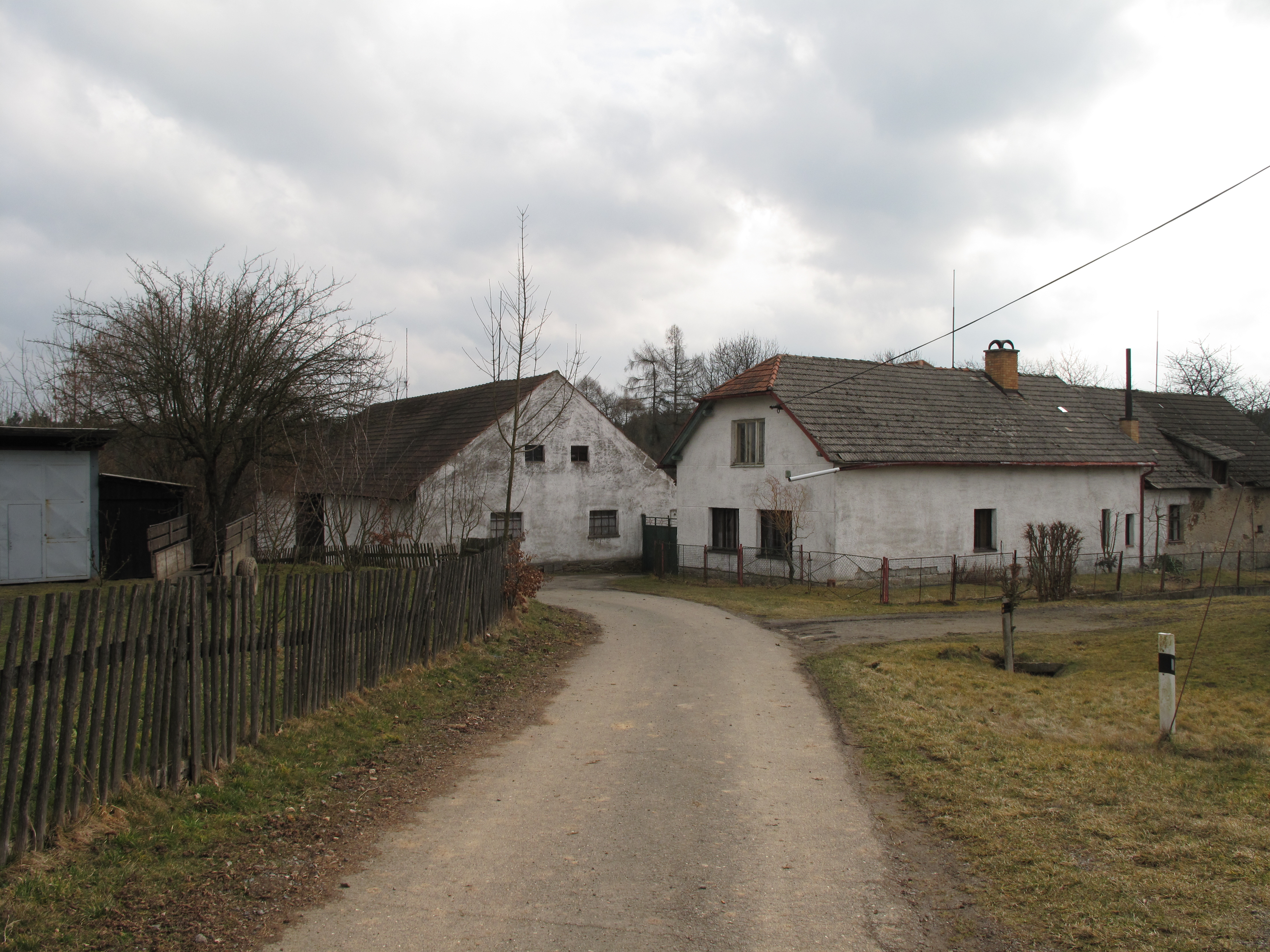 Domy ve Štičí. Okres Havlíčkův Brod, Česká republika.